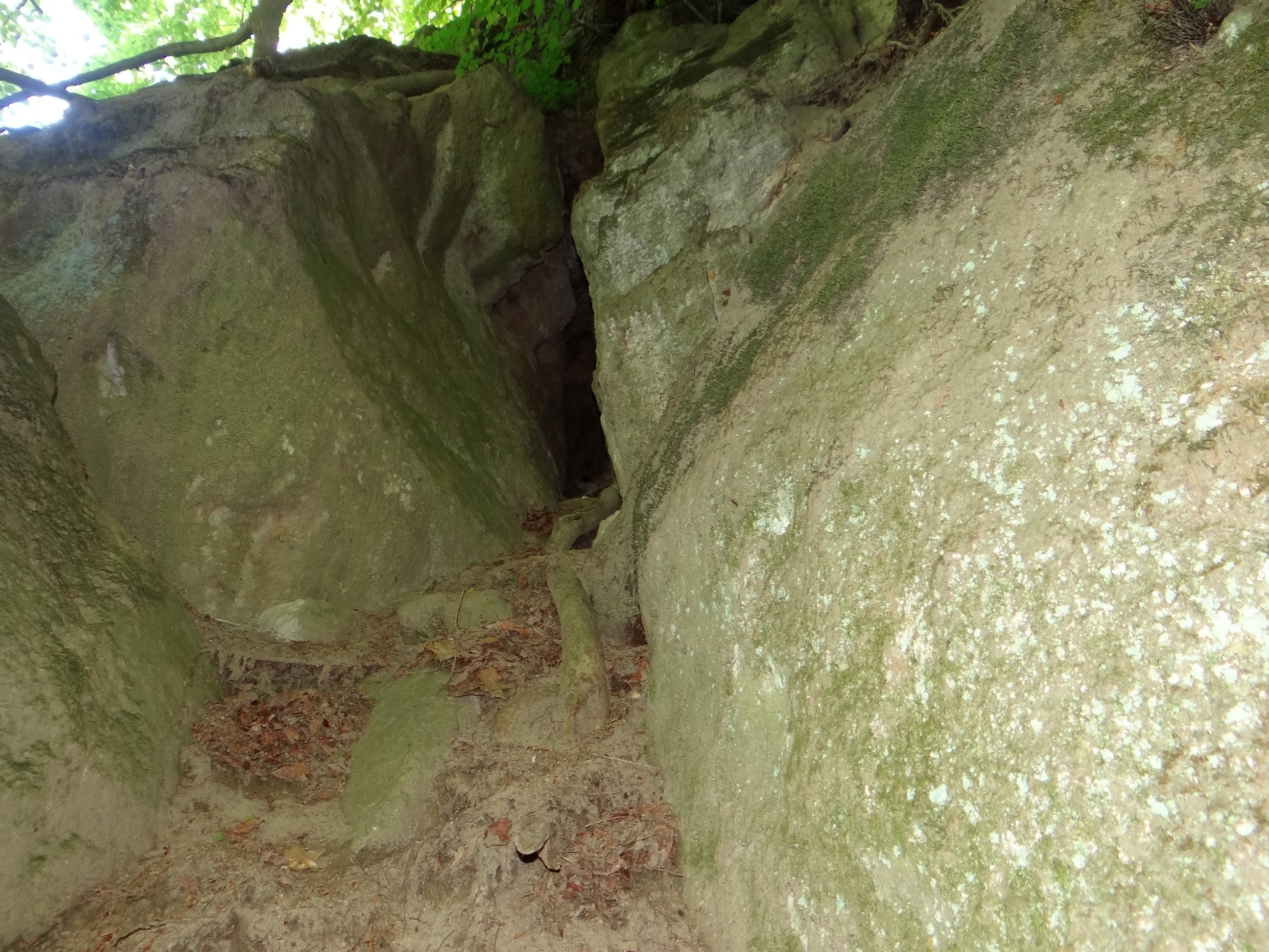 Jaskinia Zamkowa (Melsztyn)